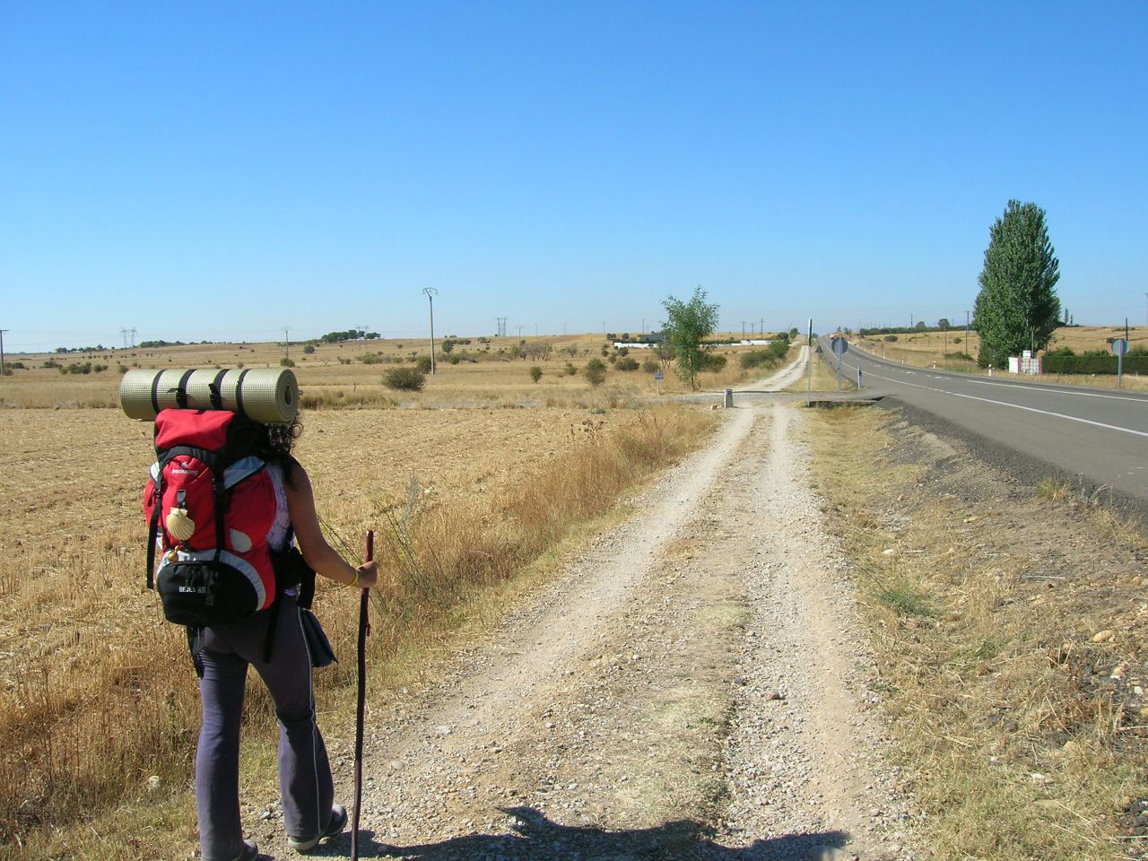 Caminando paralelos a la N-120 cerca de San Miguel del Camino. Vuela hasta esta localización (Necesitas Google Earth)